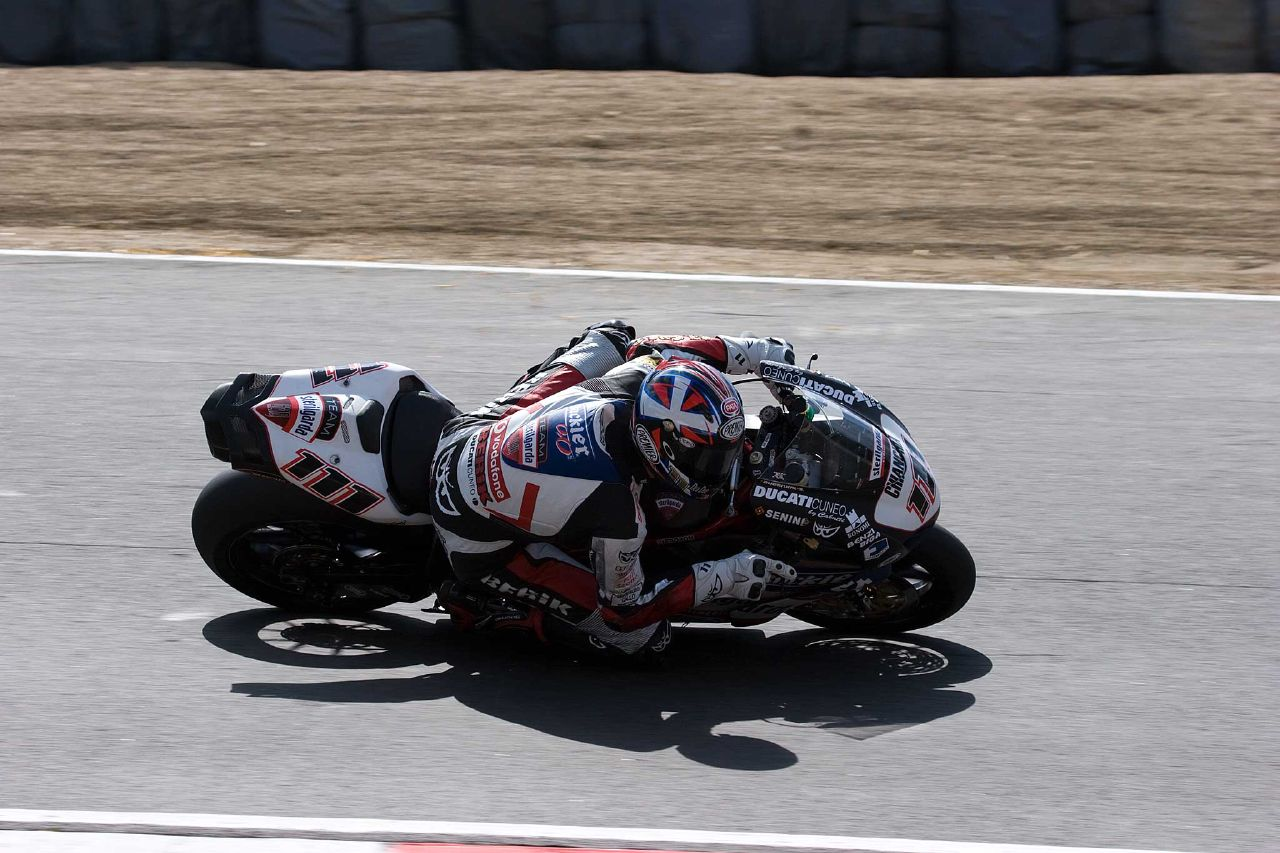 WSBK Round 10 Brands Hatch 2007